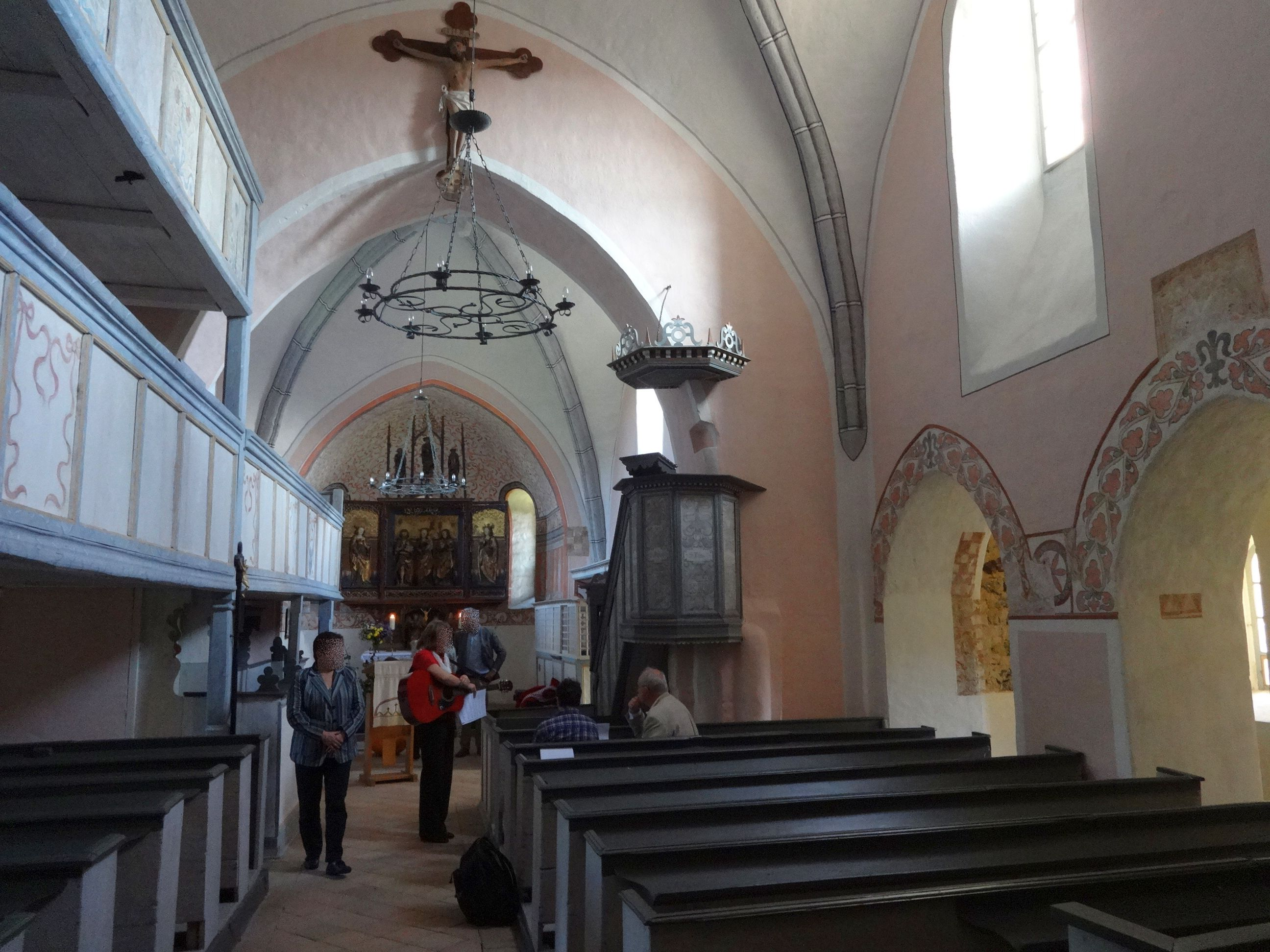 Innenraum der Dorfkirche in Schönborn-Lindena